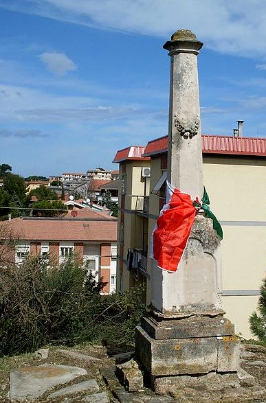 Monumento a Gervasoni e caduti di Monte Marino, eretto nel 1886